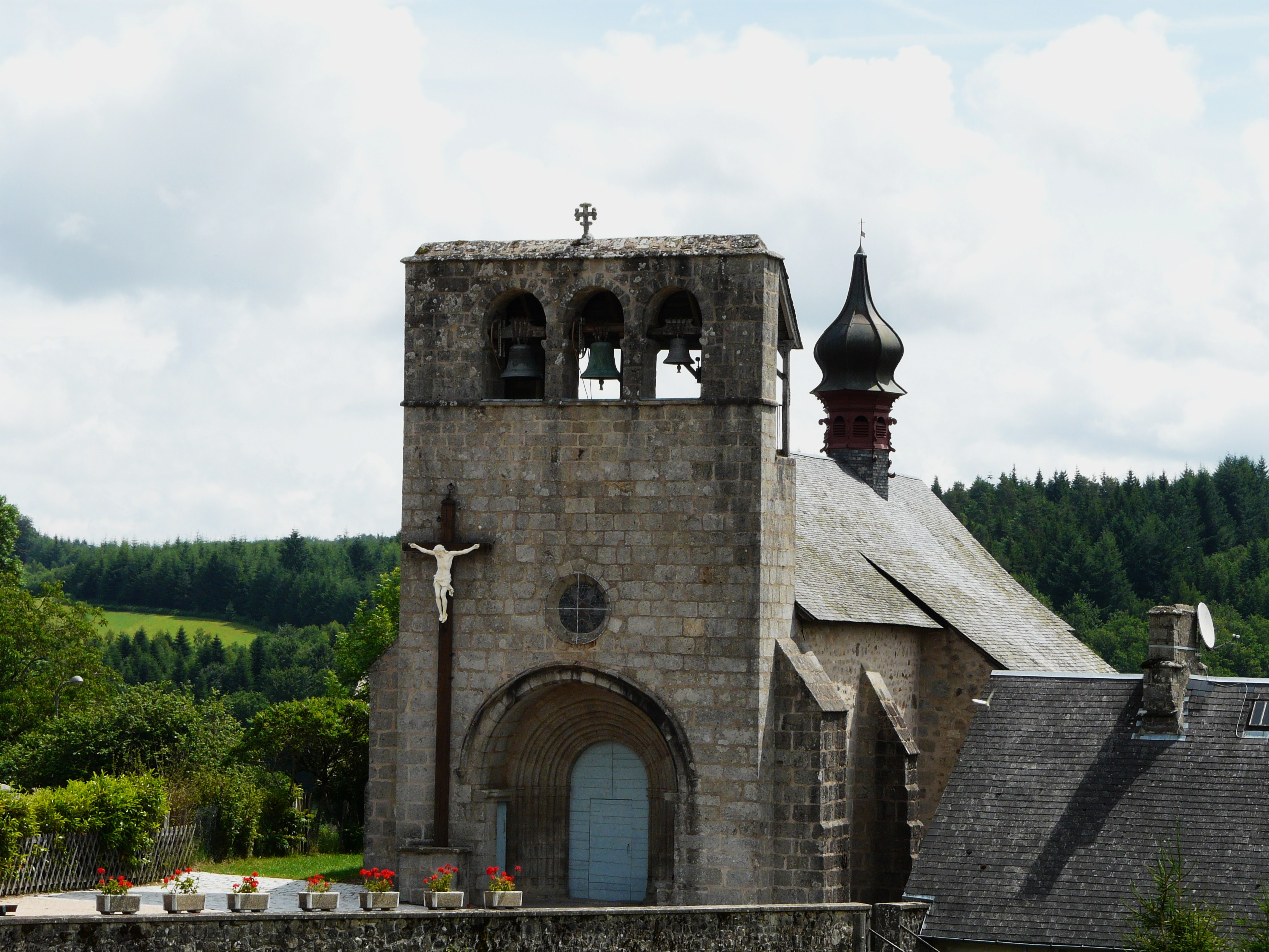 L'église Saint-Frédulphe, Saint-Fréjoux, Corrèze, France.